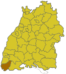 Lage des Landkreises Lörrach/Location of Lörrach county